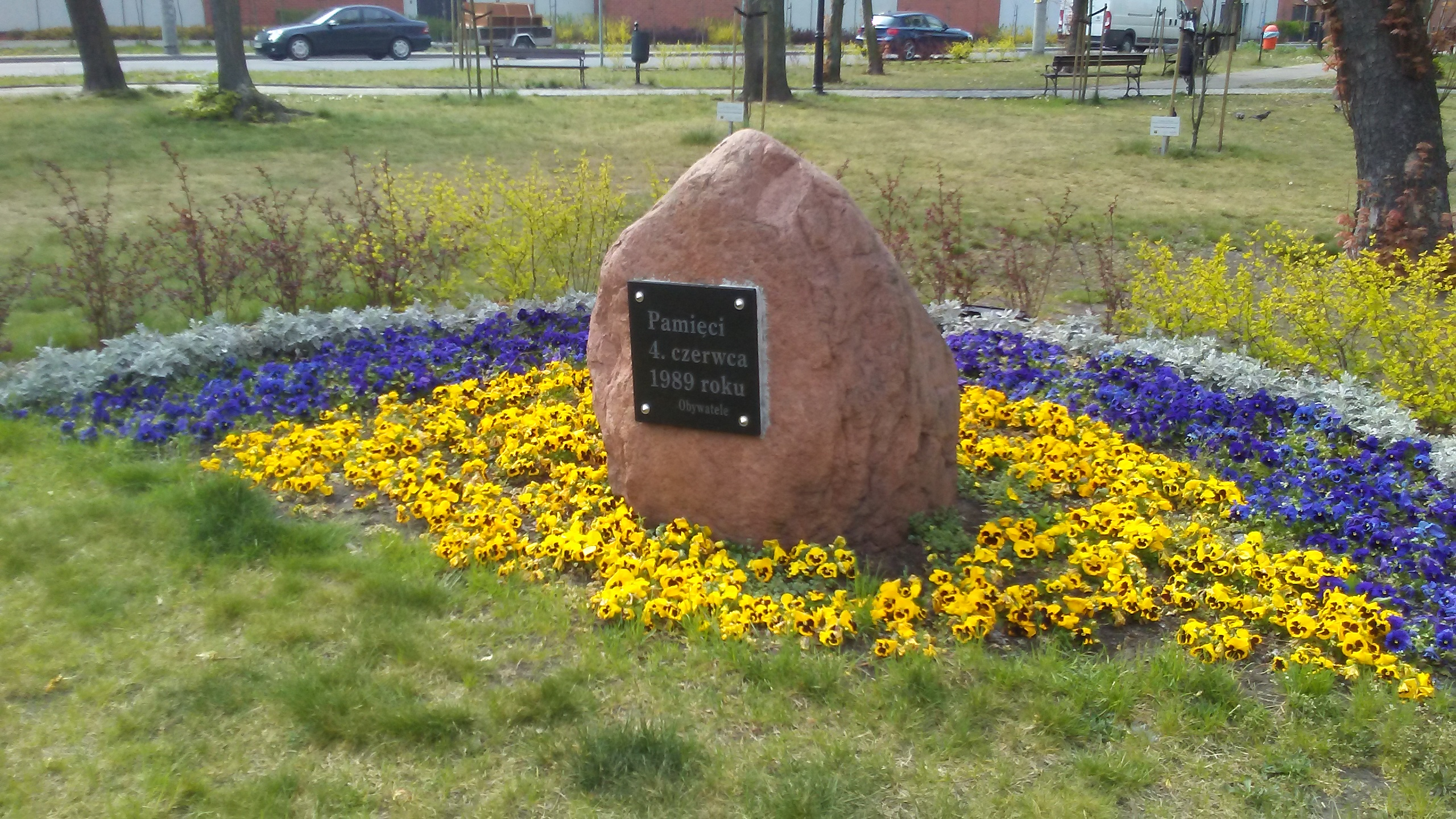 Tablica pamiątkowa na Skwerze im. Wyborów z 4 czerwca 1989 roku w Tomaszowie Mazowieckim, w województwie łódzkim.